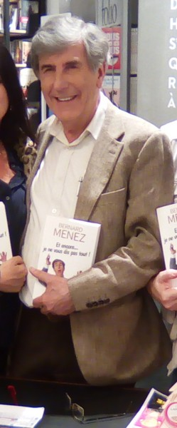 Bernard Ménez à une soirée dédicaces de son autobiographie "Et encore... je ne vous dis pas tout !".